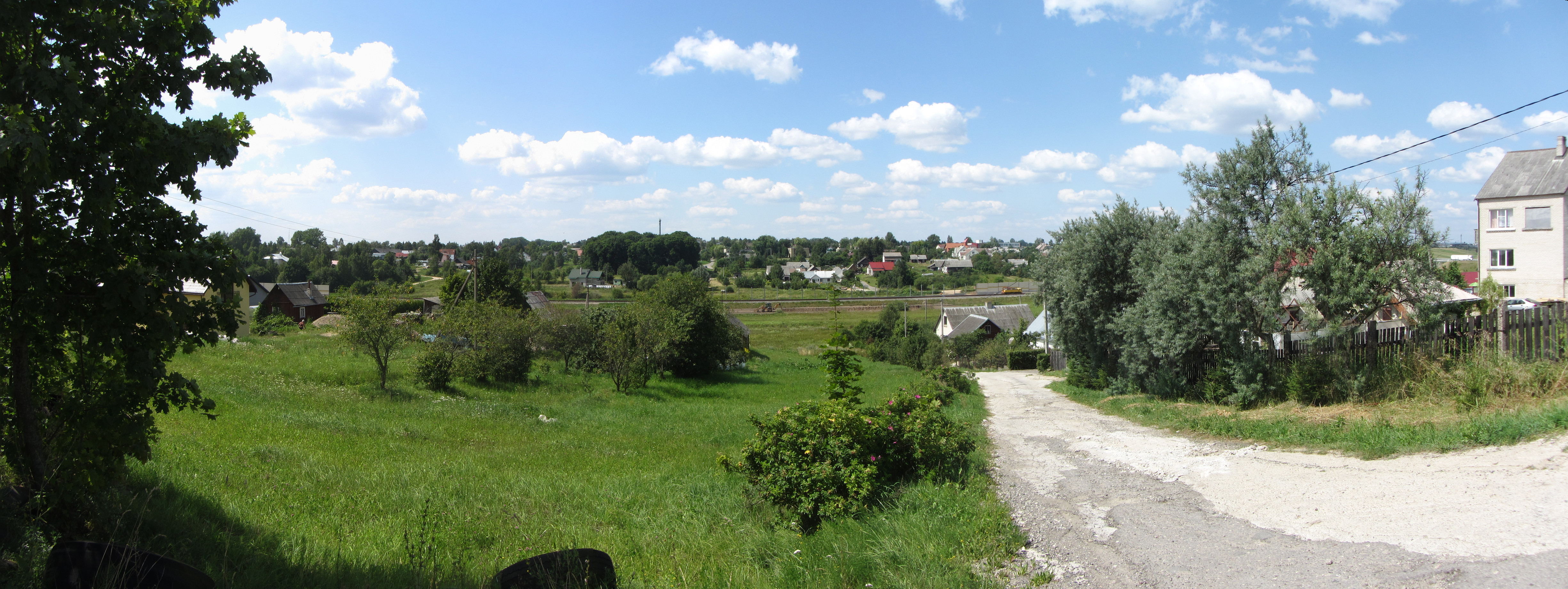 Daržininkai, Lithuania